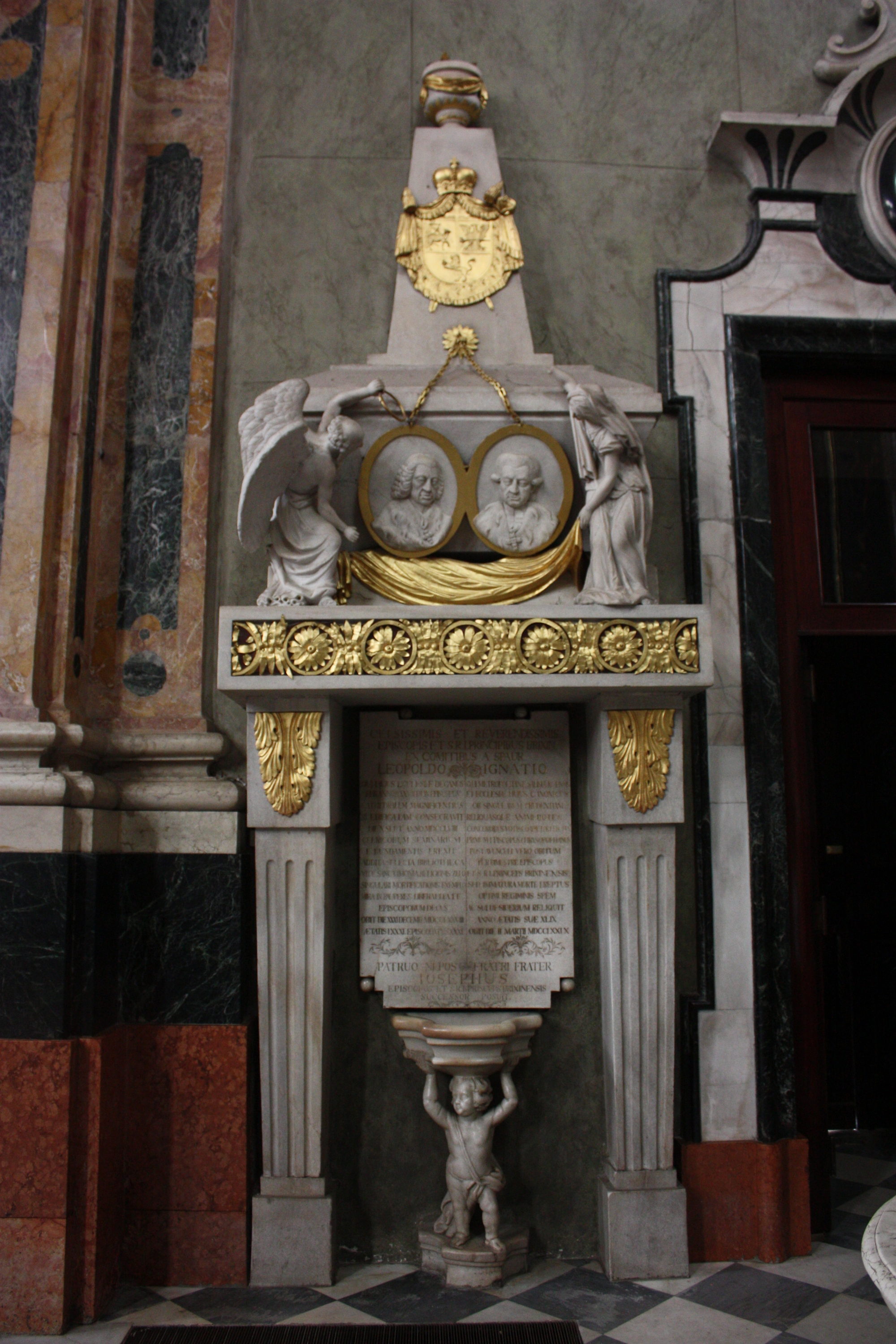 Brixner Dom (Brixen, Südtirol): Grabmal für Leopold von Spaur und Ignaz von Spaur